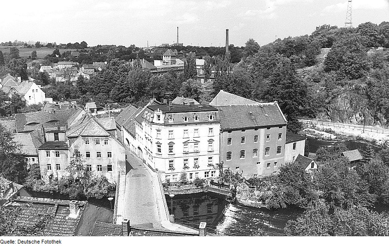 Original image description from the Deutsche Fotothek Bautzen. Hammermühle, im Hintergrund ehem. Papierfabrik